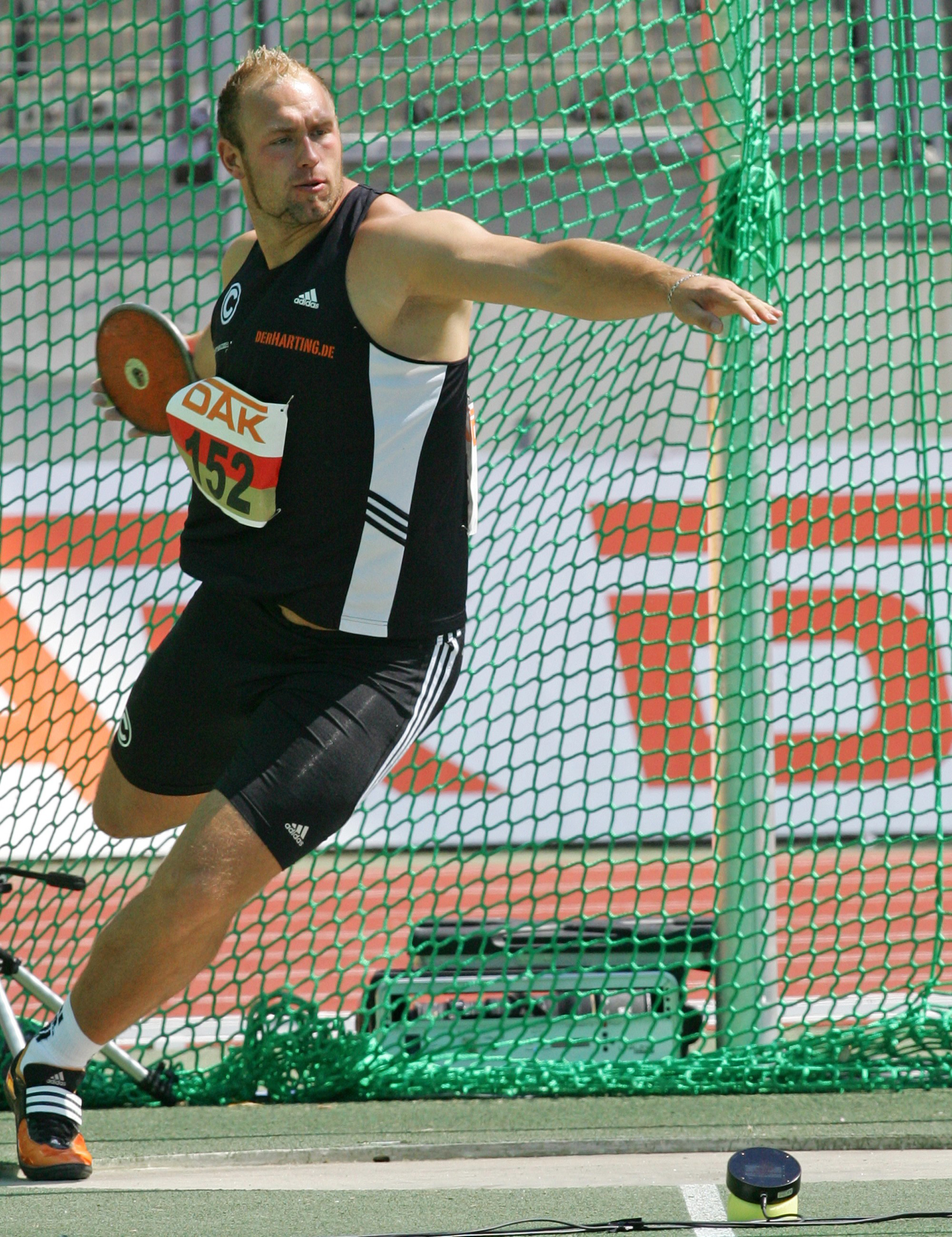 Hauptgefreiter Robert Harting von der Sportfördergruppe Potsdam beim Diskuswerfen. ©Bundeswehr/Rott